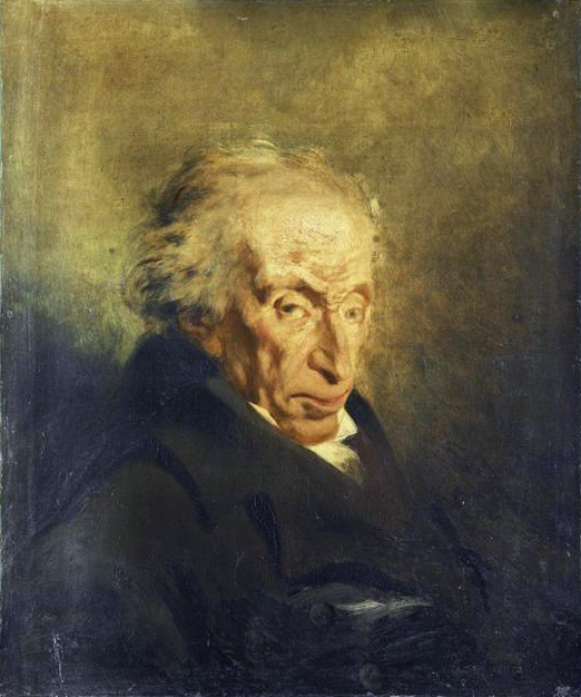 Portrait de Philippe Buonarroti par Philippe-Auguste Jeanron, Paris, Musée national du Louvre.